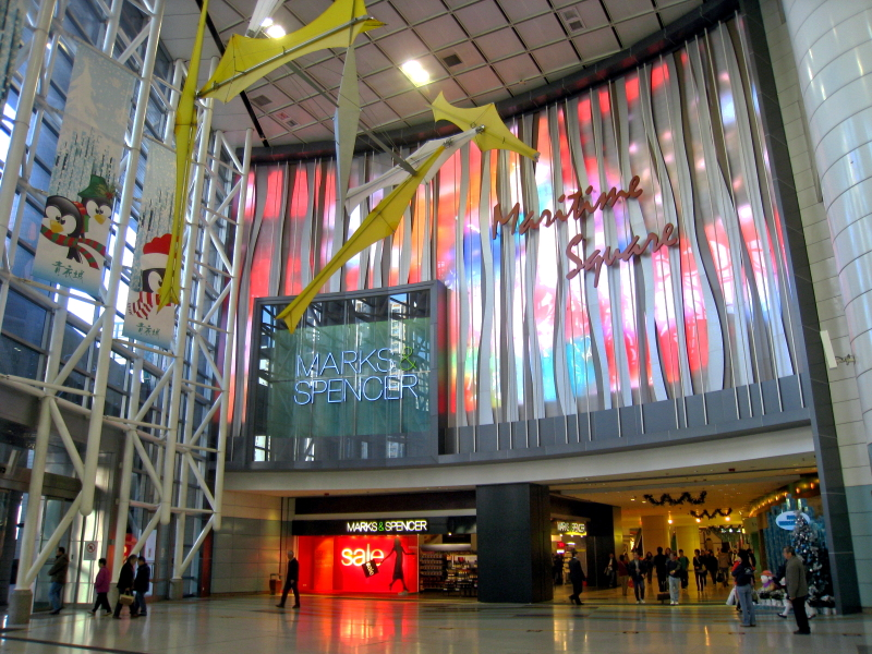 Maritime Square 青衣城